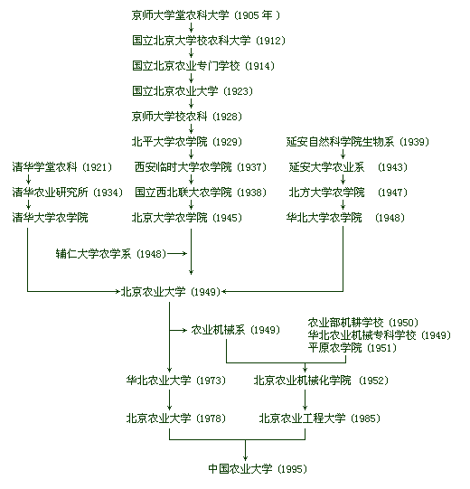 中国农业大学校史示意图